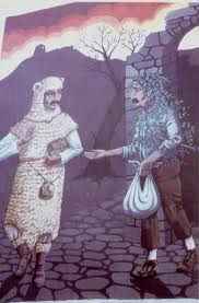 Autore: Fonte: Descrizione: Murales di Orso e Romita Licenza d'uso: libera Note: nessuna